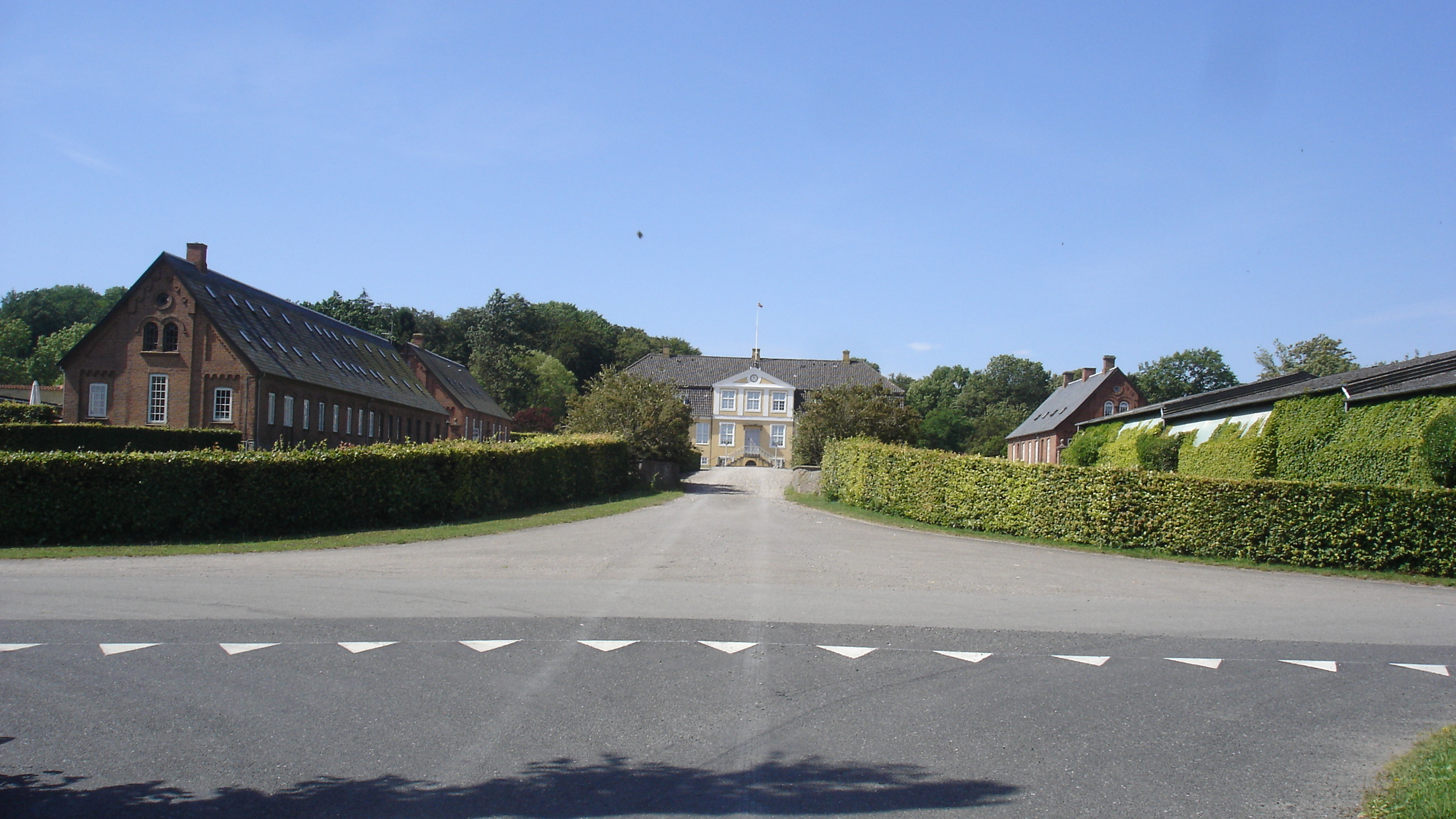 Engelholm Gods